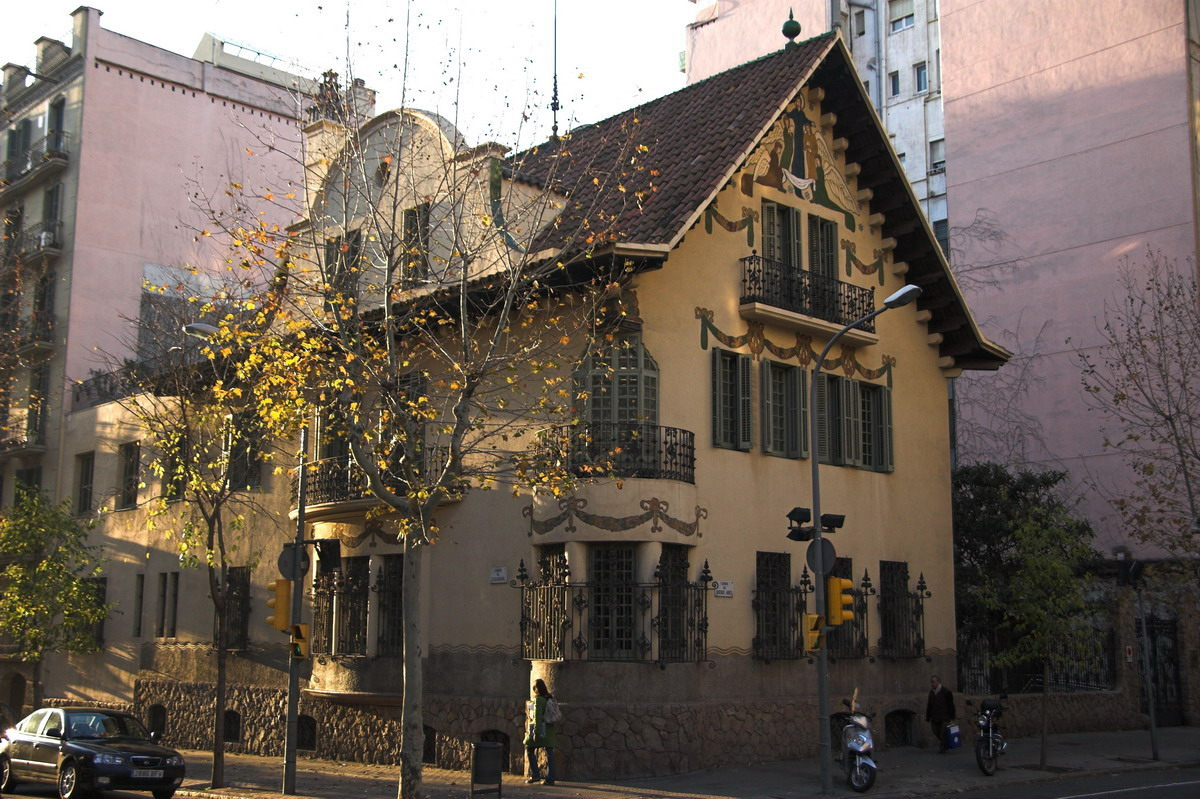 Casa Pere Company (Barcelona-Catalunya), obra de Josep Puig i Cadafalch 1911. C/Buenos Aires, 56. Vista general.